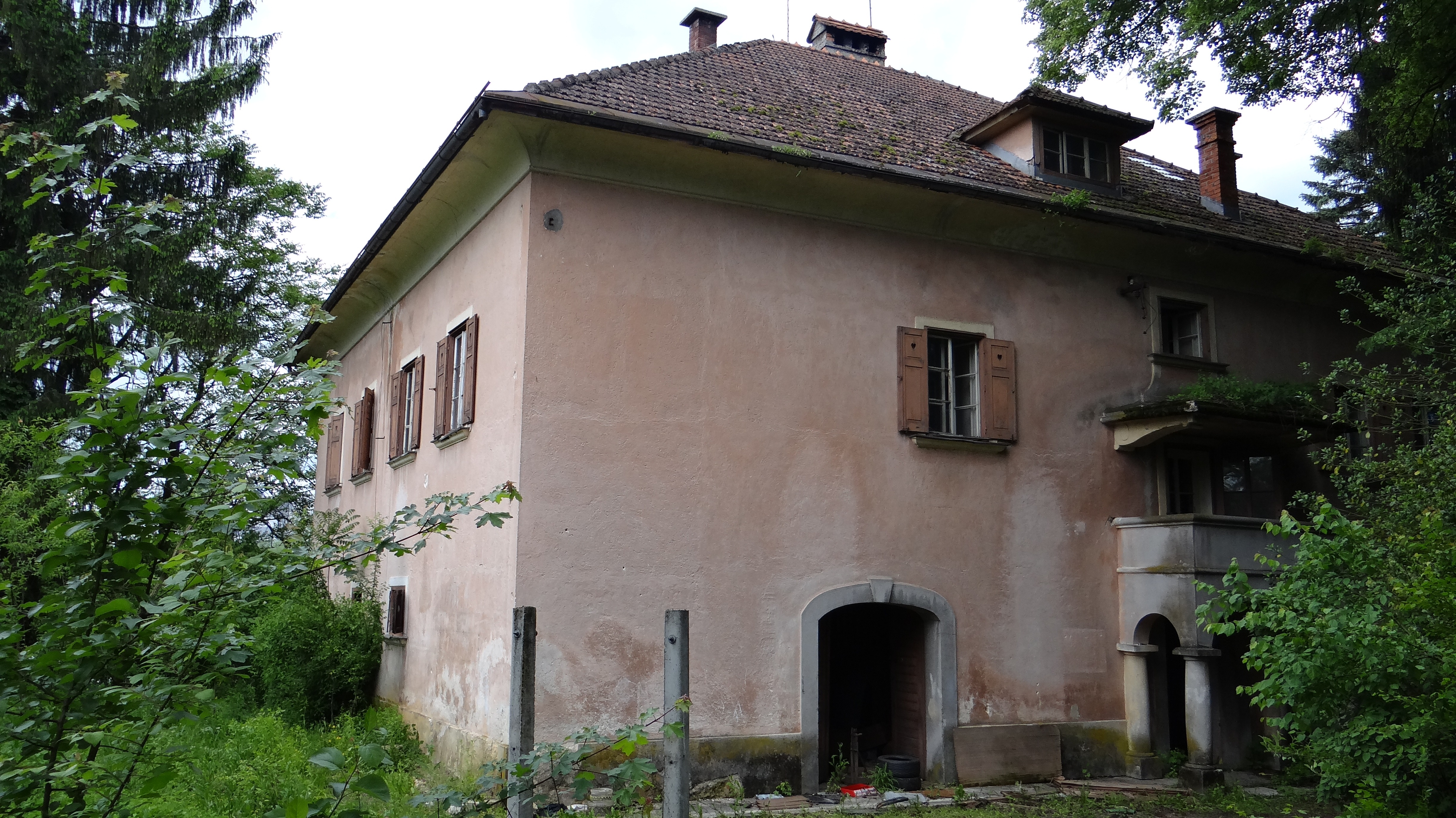 Grad Graben III. 2013